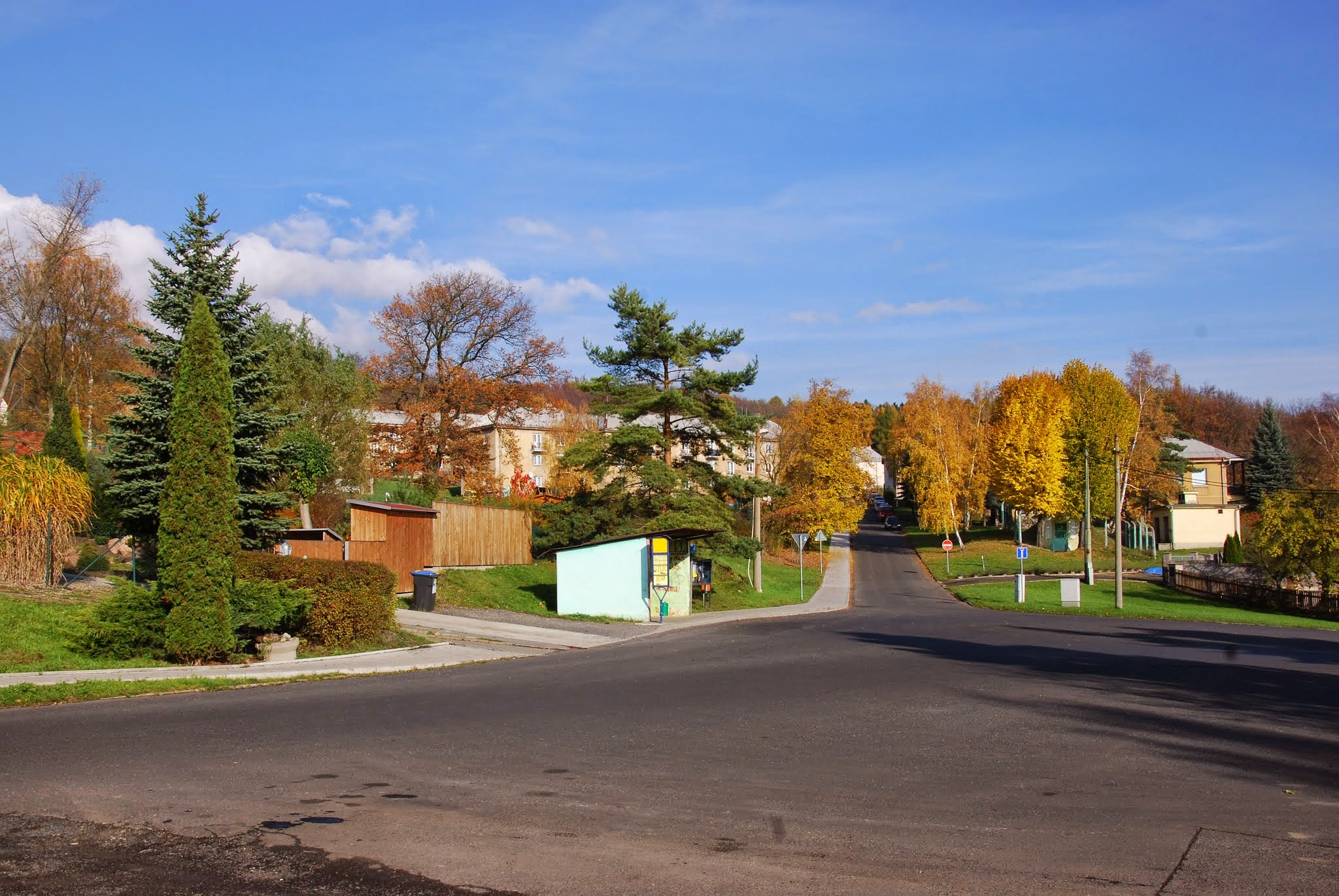 Sídliště Střelná od autobusové zastávky Střelná, Sídliště. Foceno na podzim 2014